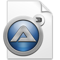 Icon eines AutoIt-Skripts